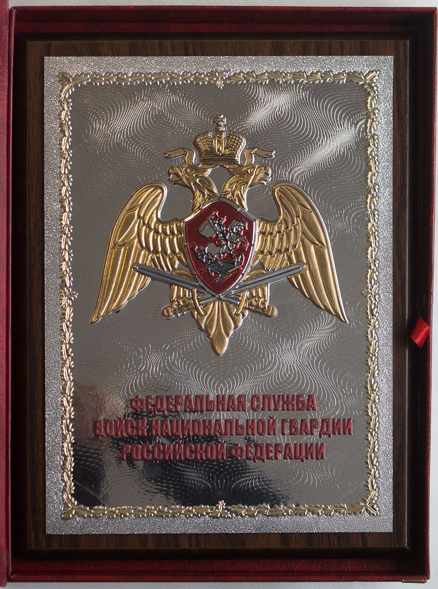 Прямоугольные плакетки с барельефным тиснением. Это новый вид плакеток с рельефом. Шильды делаются по технологии барельефных магнитов, но площадь изделия гораздо больше. Высота рельефа при желании может достигать 3 мм, с высоким качеством проработки мелких деталей.